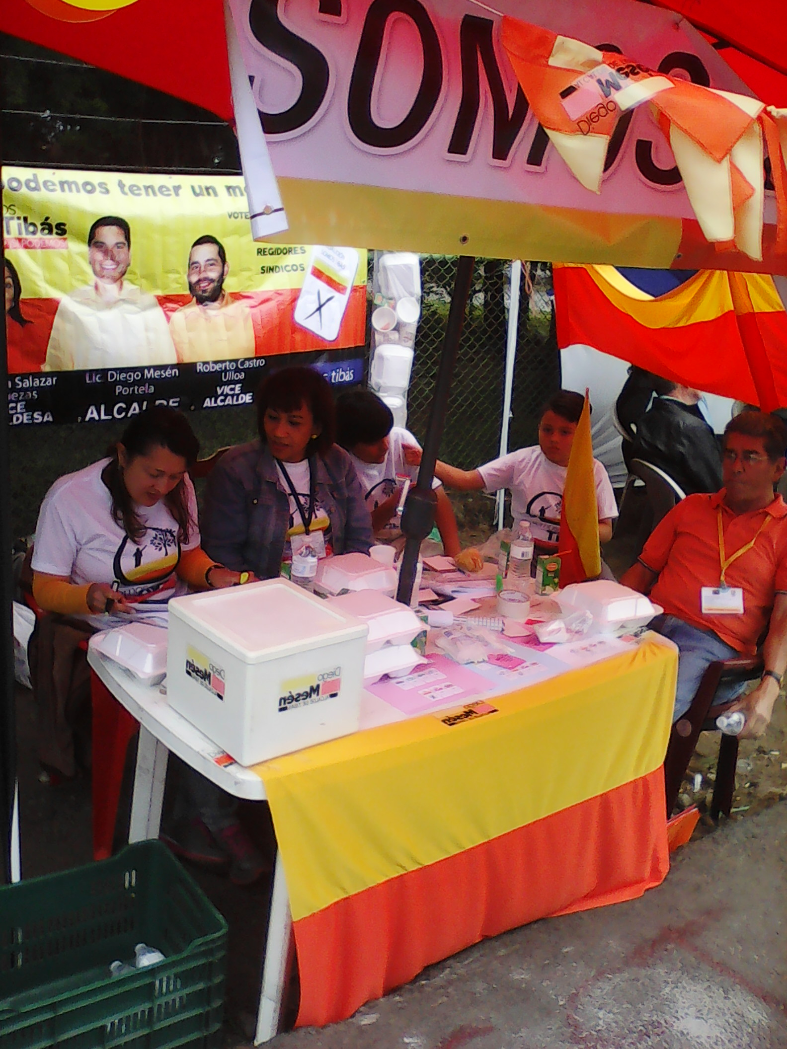 Stand de Coalición Somos Tibas elecciones municipales de 2016, fotografia tomada por mi persona